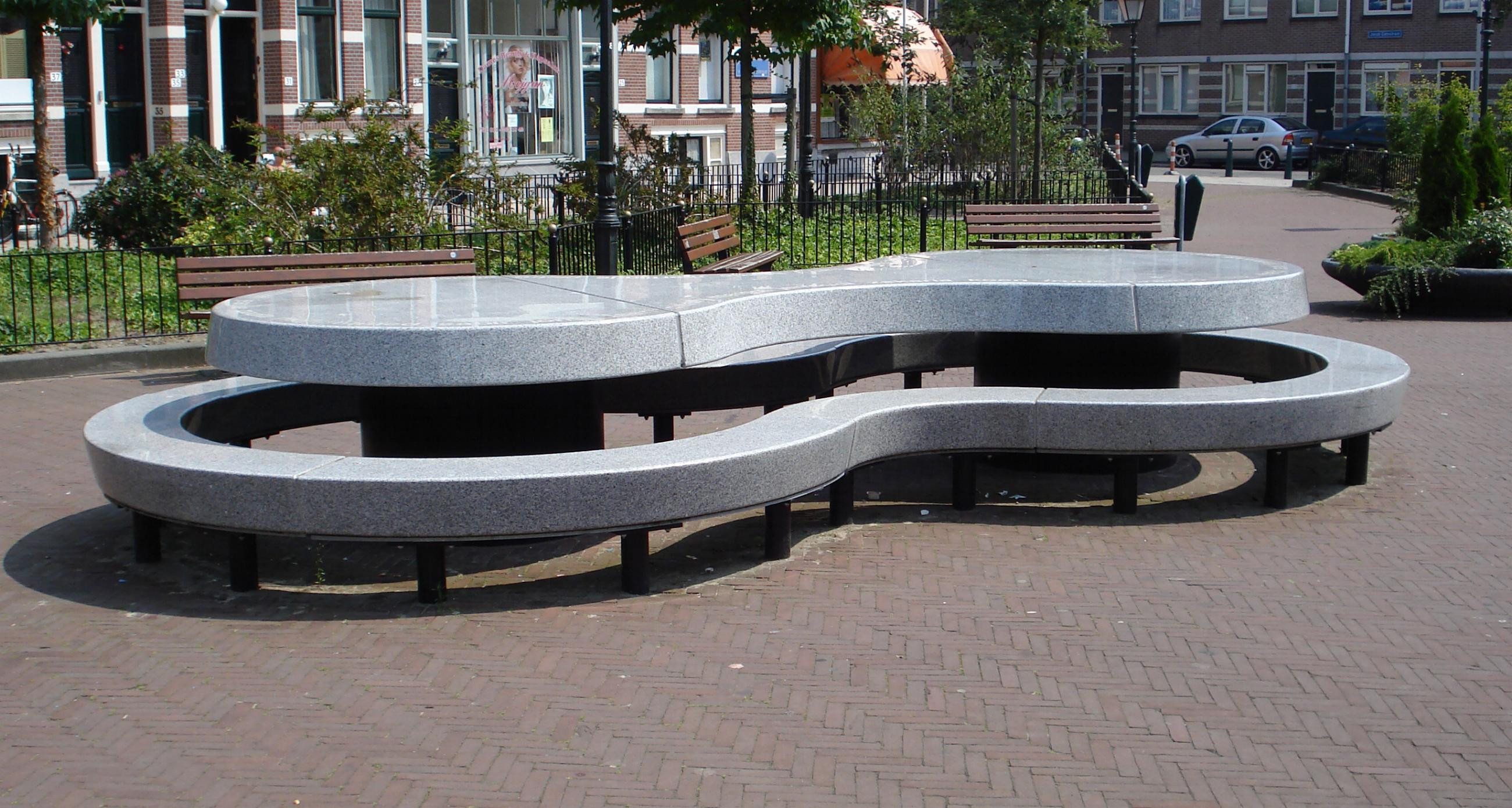 Rotterdam, Brancoplein. Kunstwerk "Tafelbank" van Jeroen Hoogstraten. Rotterdam/The Netherlands.